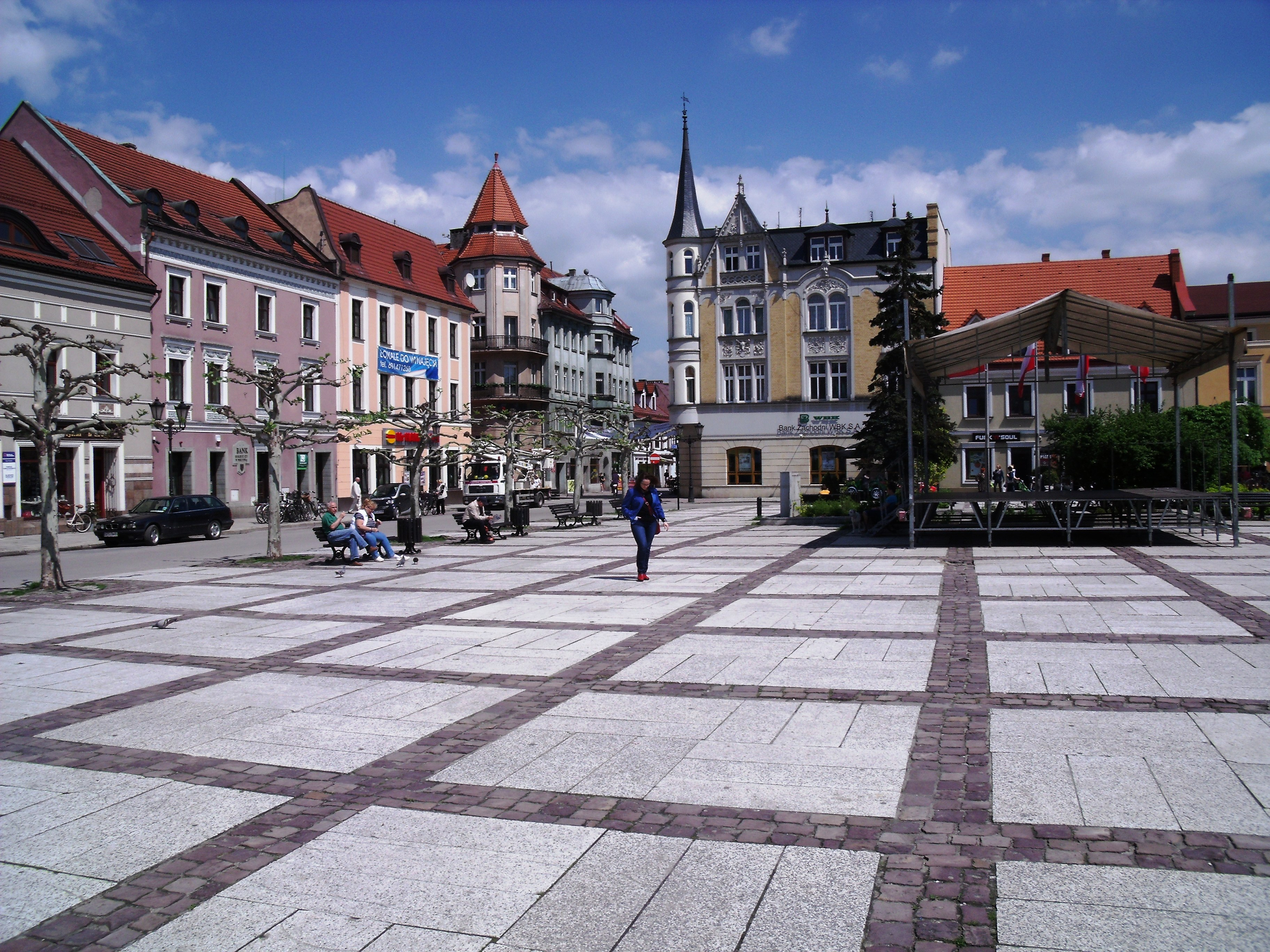 Pszczyna. Rynek